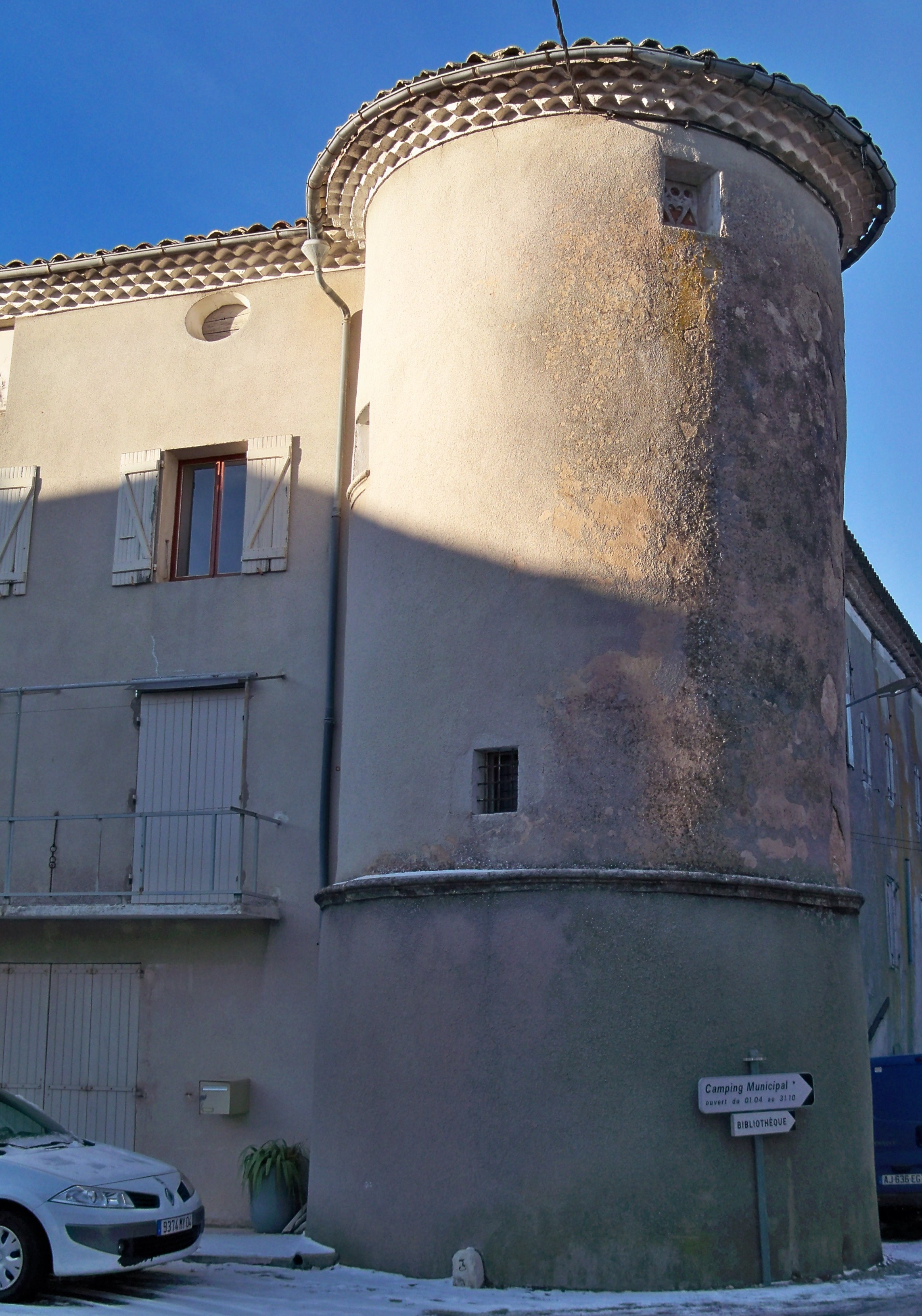 Tour des anciens remparts de Revest-du-Bion (04)